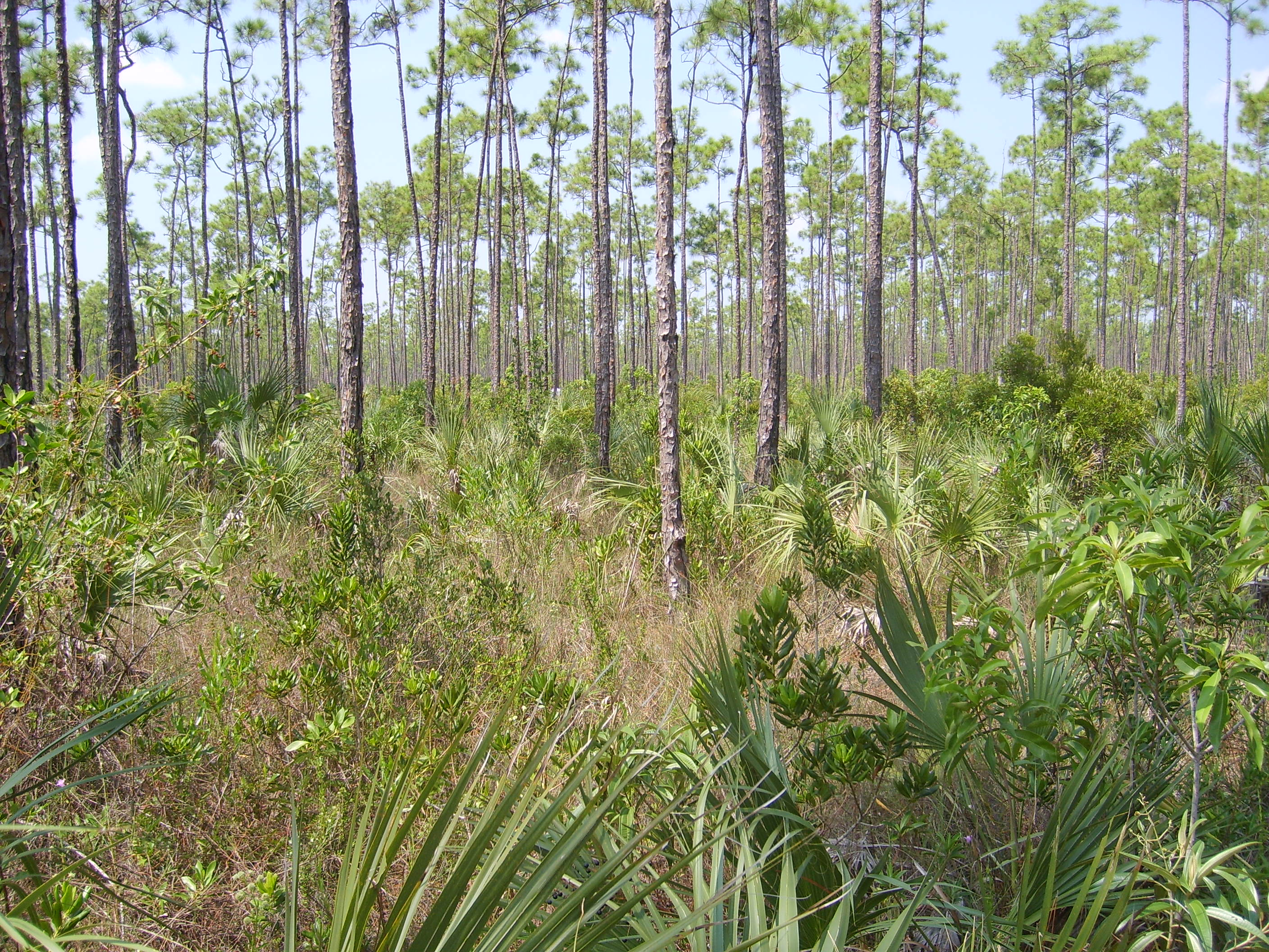 Pinedeeverglades3